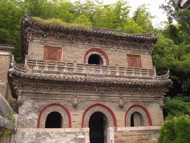 隆昌寺 無梁殿 2004年6月5日撮影 撮影者：権作 参照：